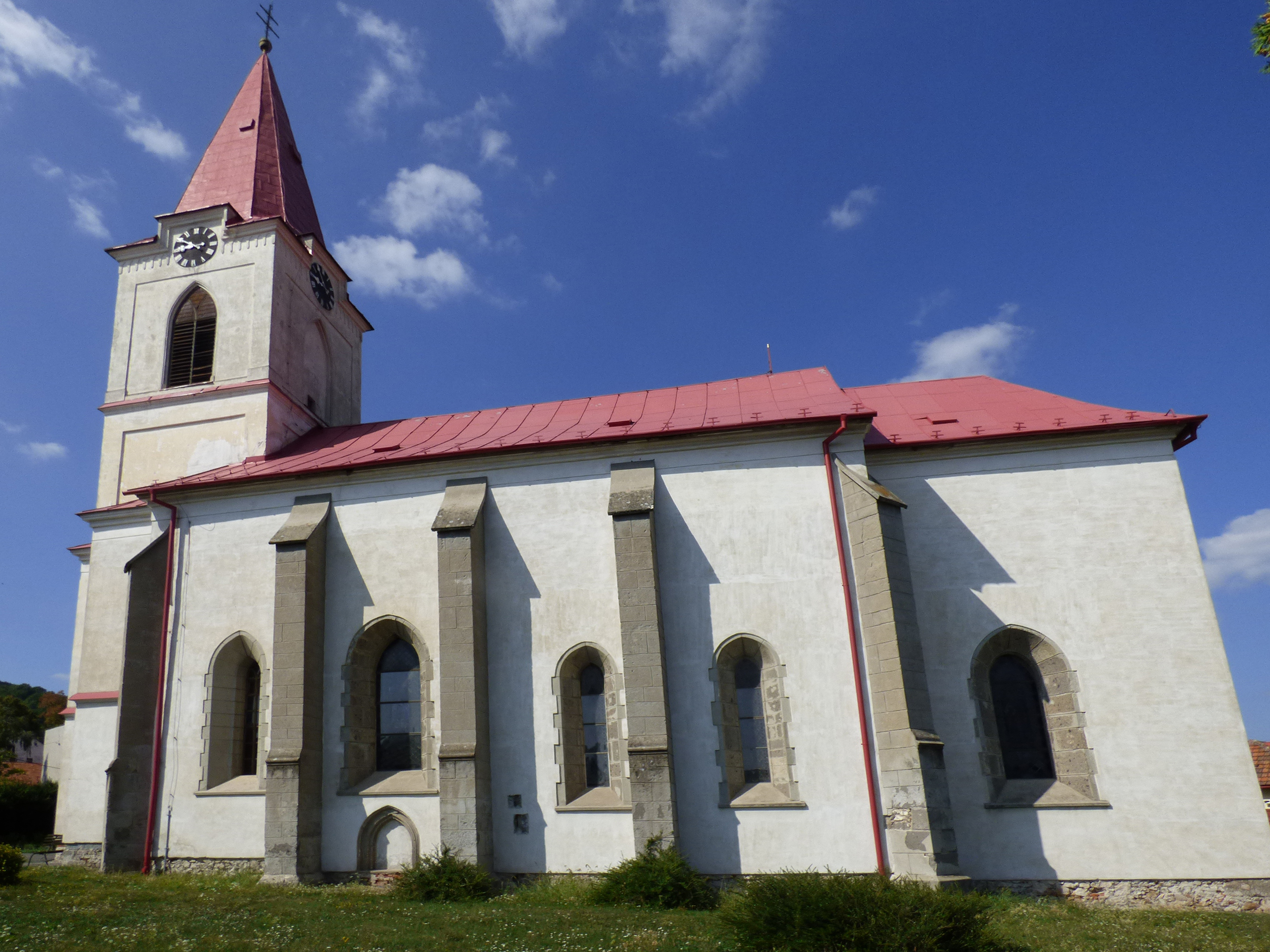 Exteriér kostola sv. Mikuláša v Pukanci